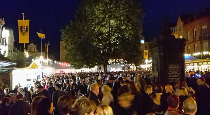 Weinfest 2015 auf dem Marktplatz in Boppard